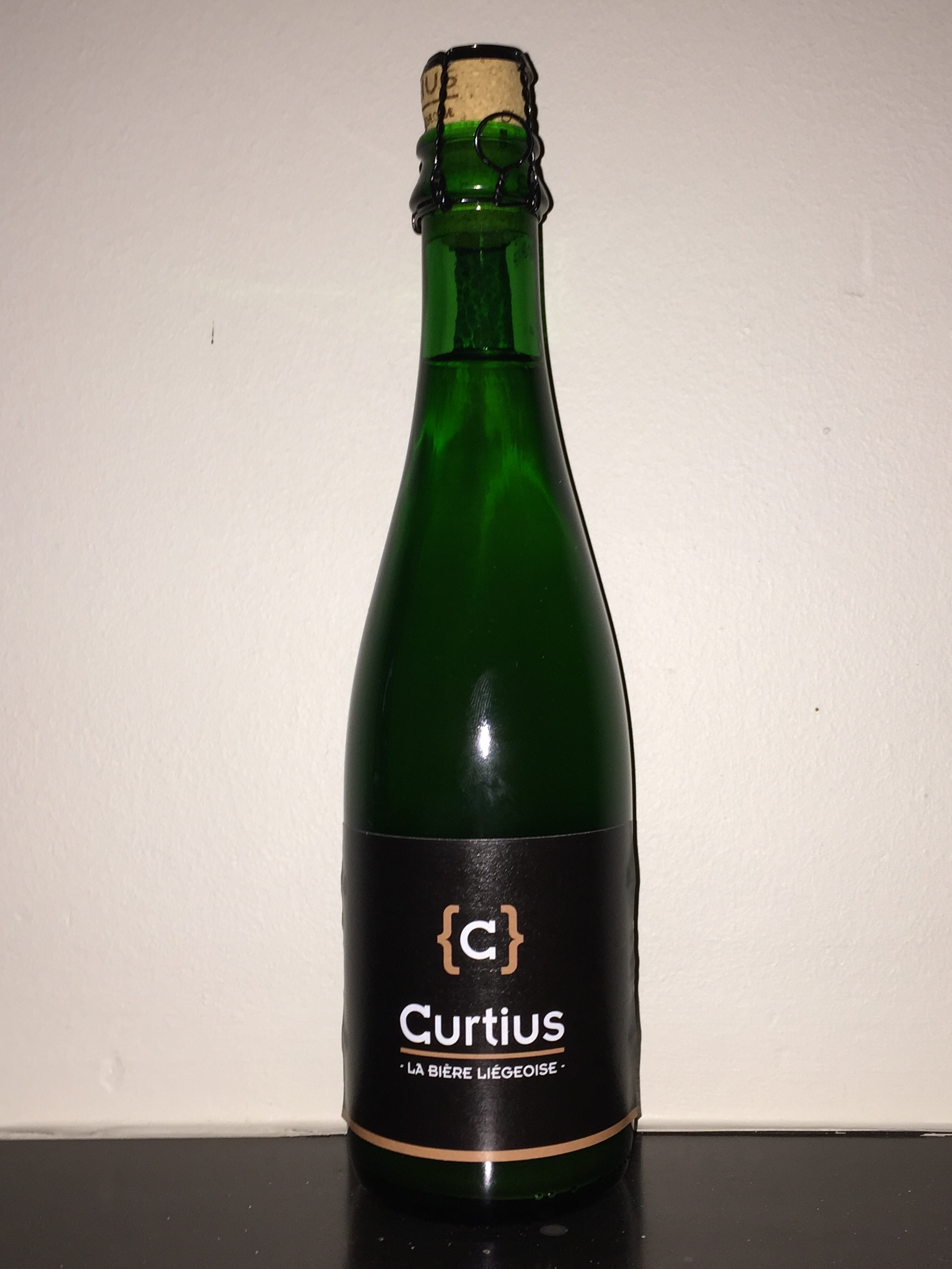 La Curtius est une bière belge brassée à la Brasserie C, Microbrasserie de la Principauté à Liège en Belgique.